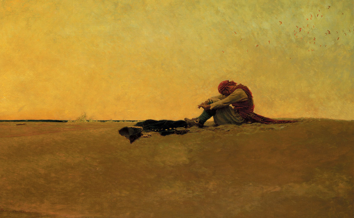 detail